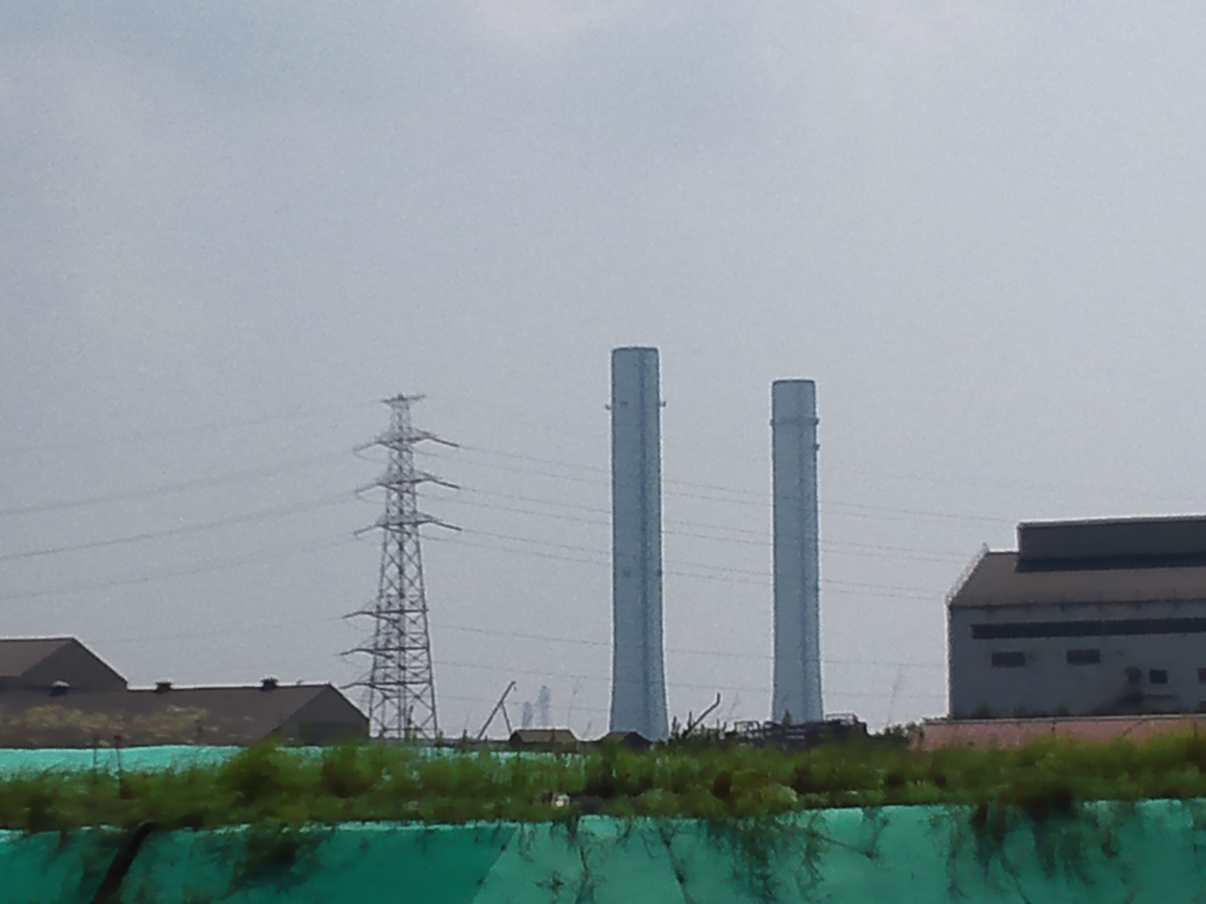 東京電力千葉火力発電所